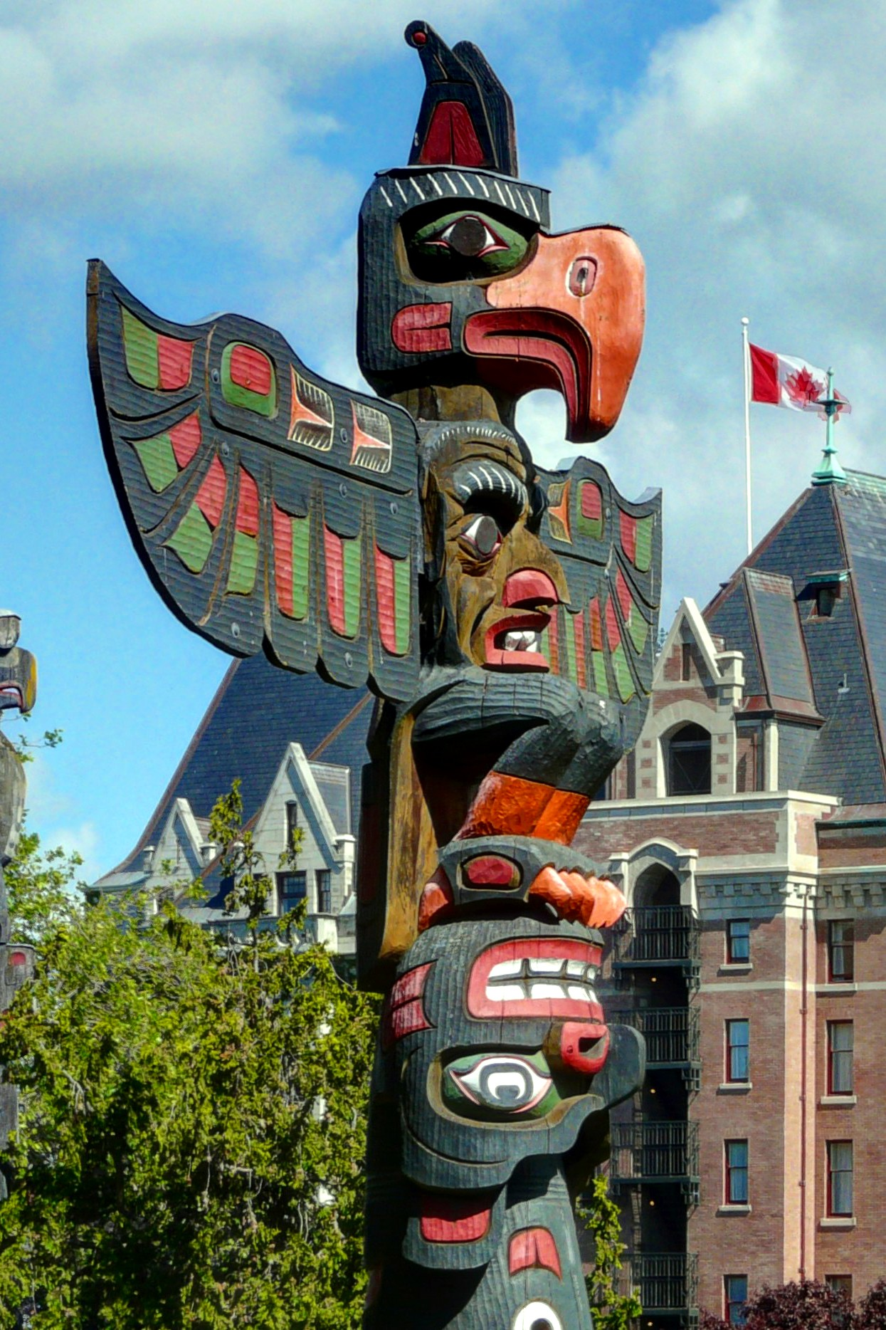 totem dans le parc Thunderbird à Victoria (Colombie Britanique)